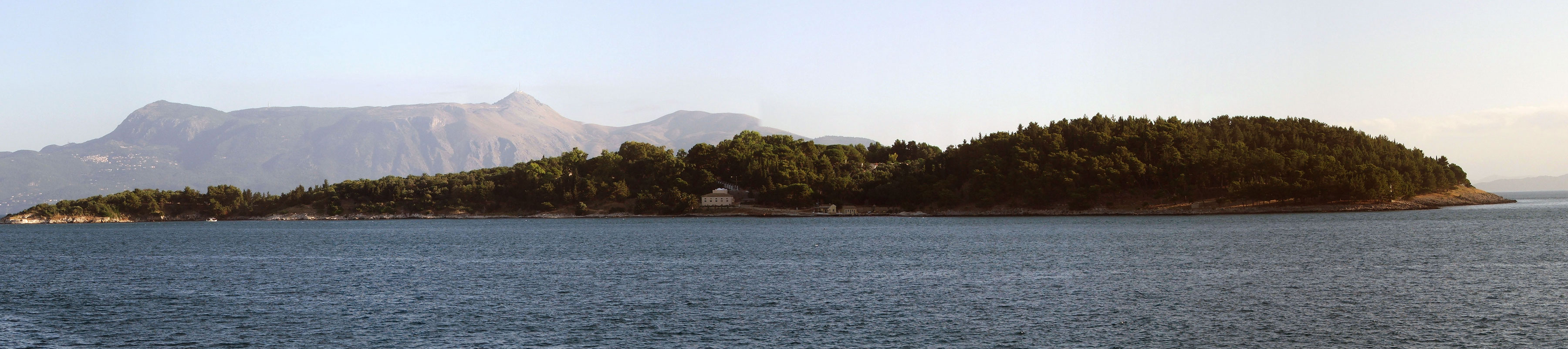 Vido island on Vidovdan 2007